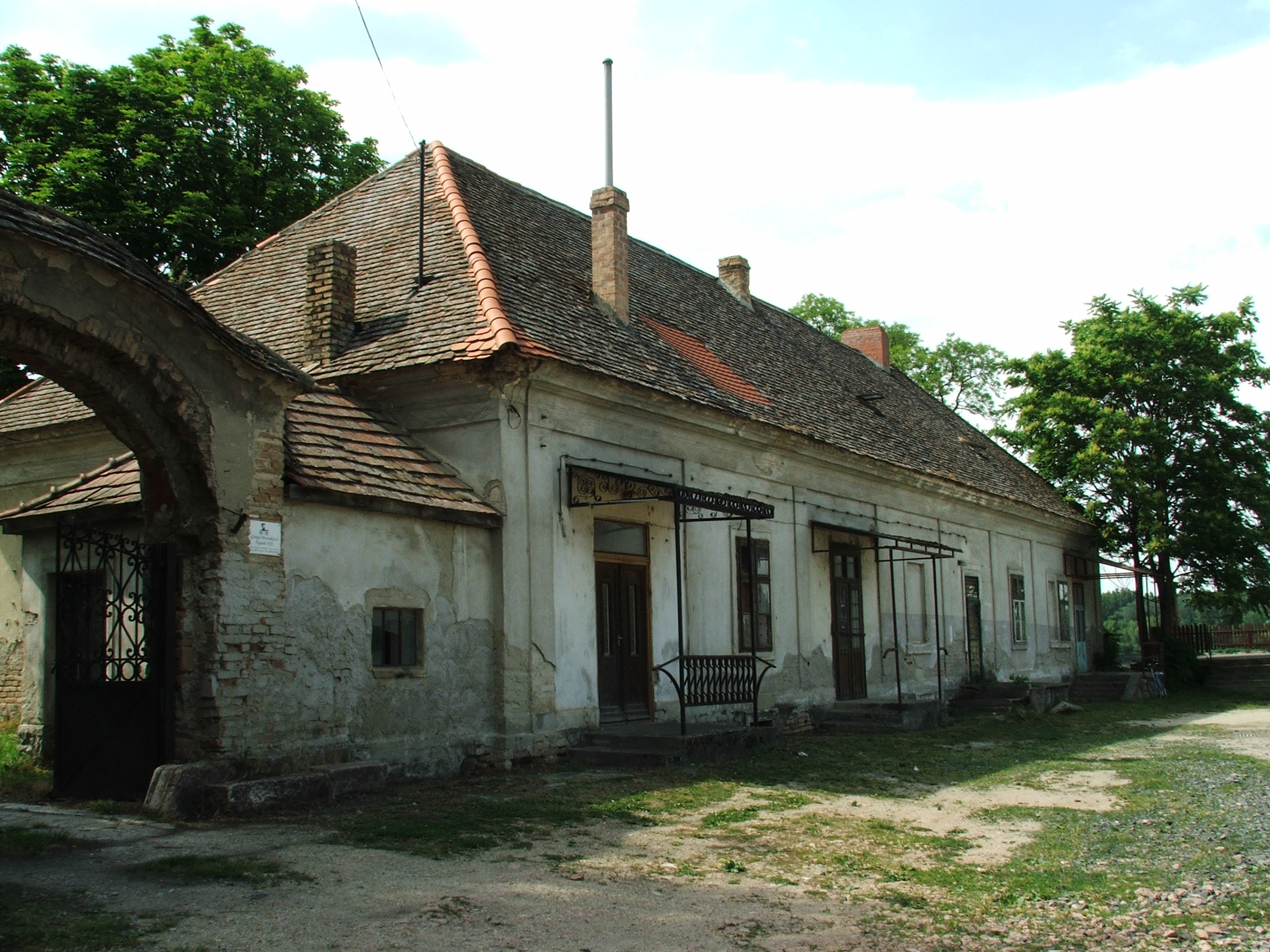 Vendéglő, postakocsi-fogadó, Gönyű This is a photo of a monument in Hungary. Identifier: 4150